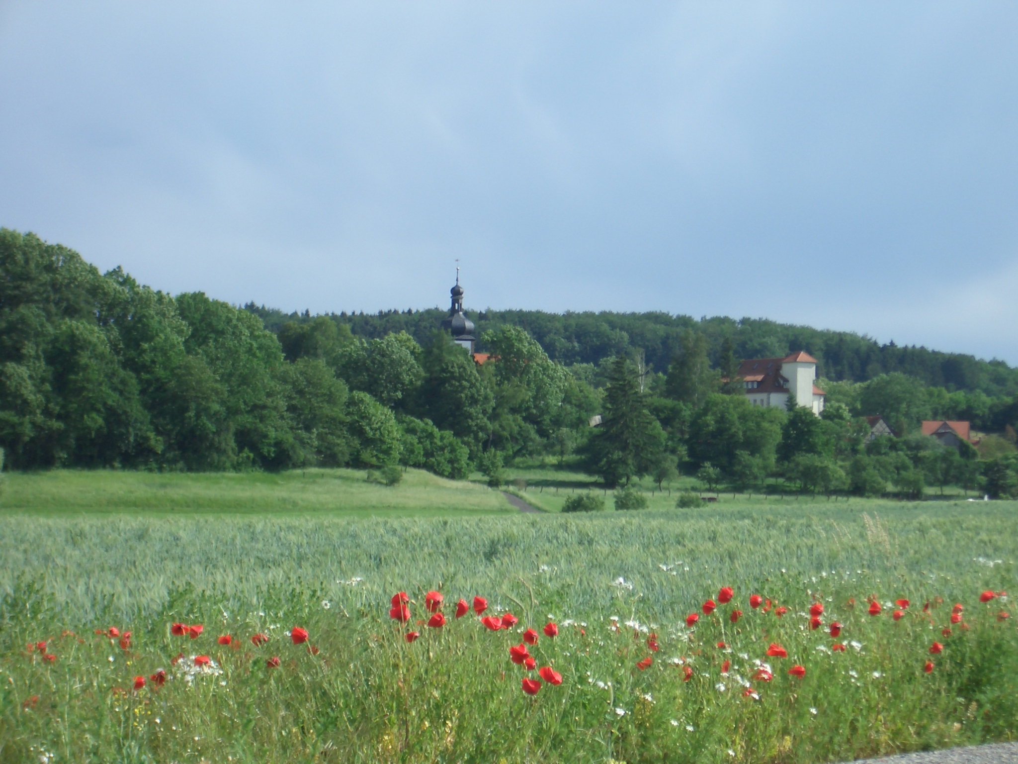 Schweickershausen